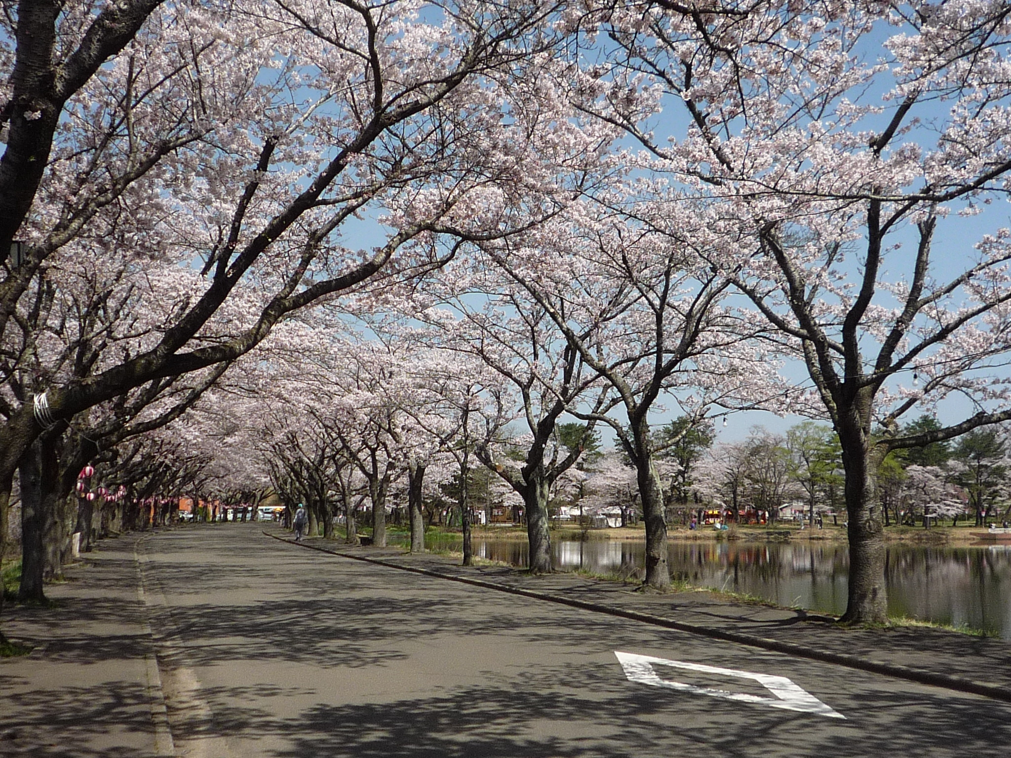 新観光秋田30景 鷹巣中央公園の桜 （ソメイヨシノを中心に、シダレザクラ、ヤエザクラ、ヤマザクラなど約900本が植えられていて、夜にはライトアップされる）